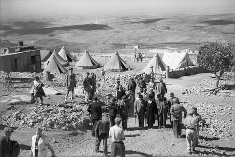 "משואות יצחק" - קבלת פנים לאורחי "המזרחי" מחוץ לארץ ומתן שם לישוב שיהיה קשור עם שמו של הרב הרצוג.